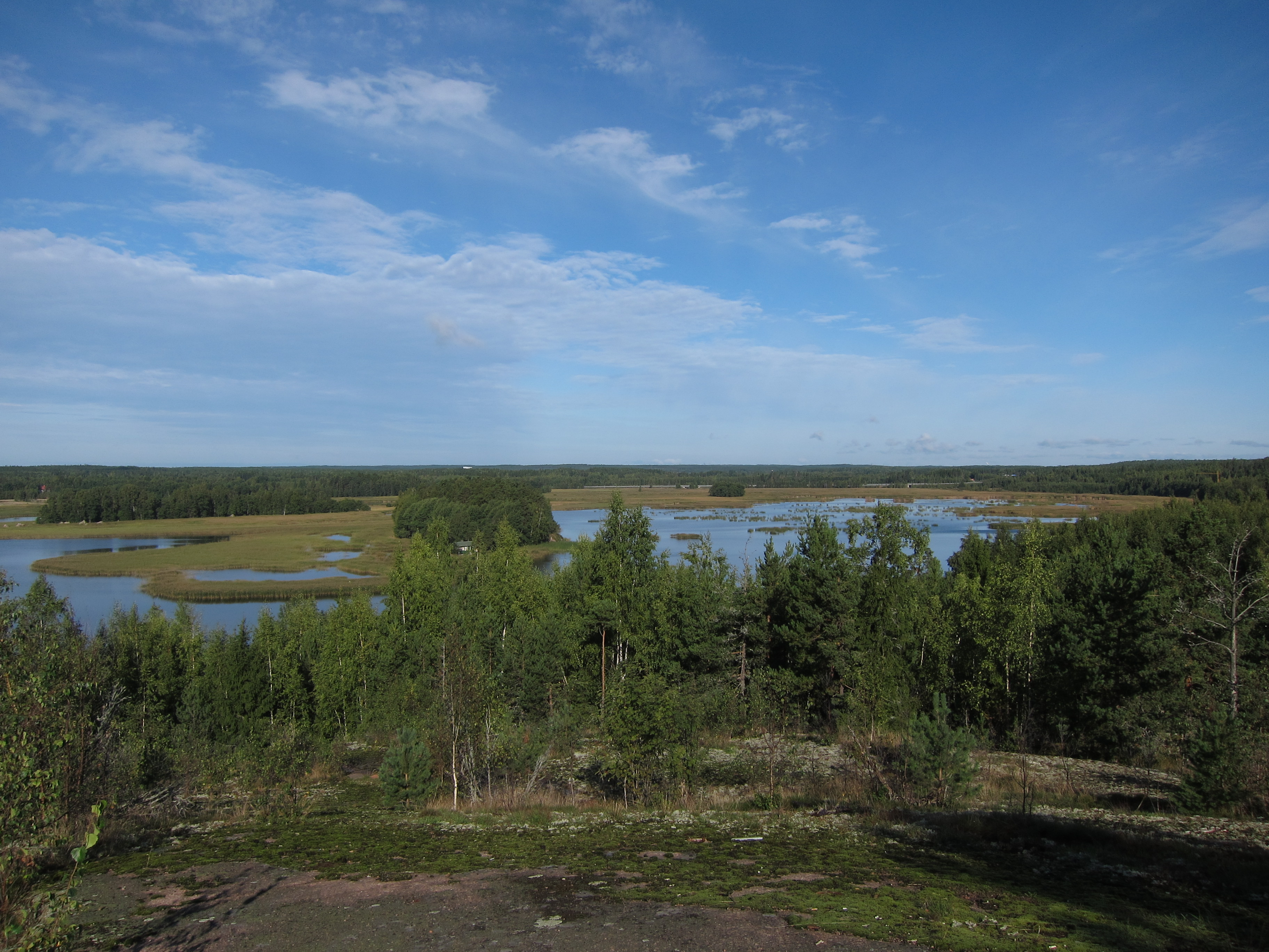 Suomenlahden Kaarniemenlahden pohjukkaa Kotkassa ja Haminassa.